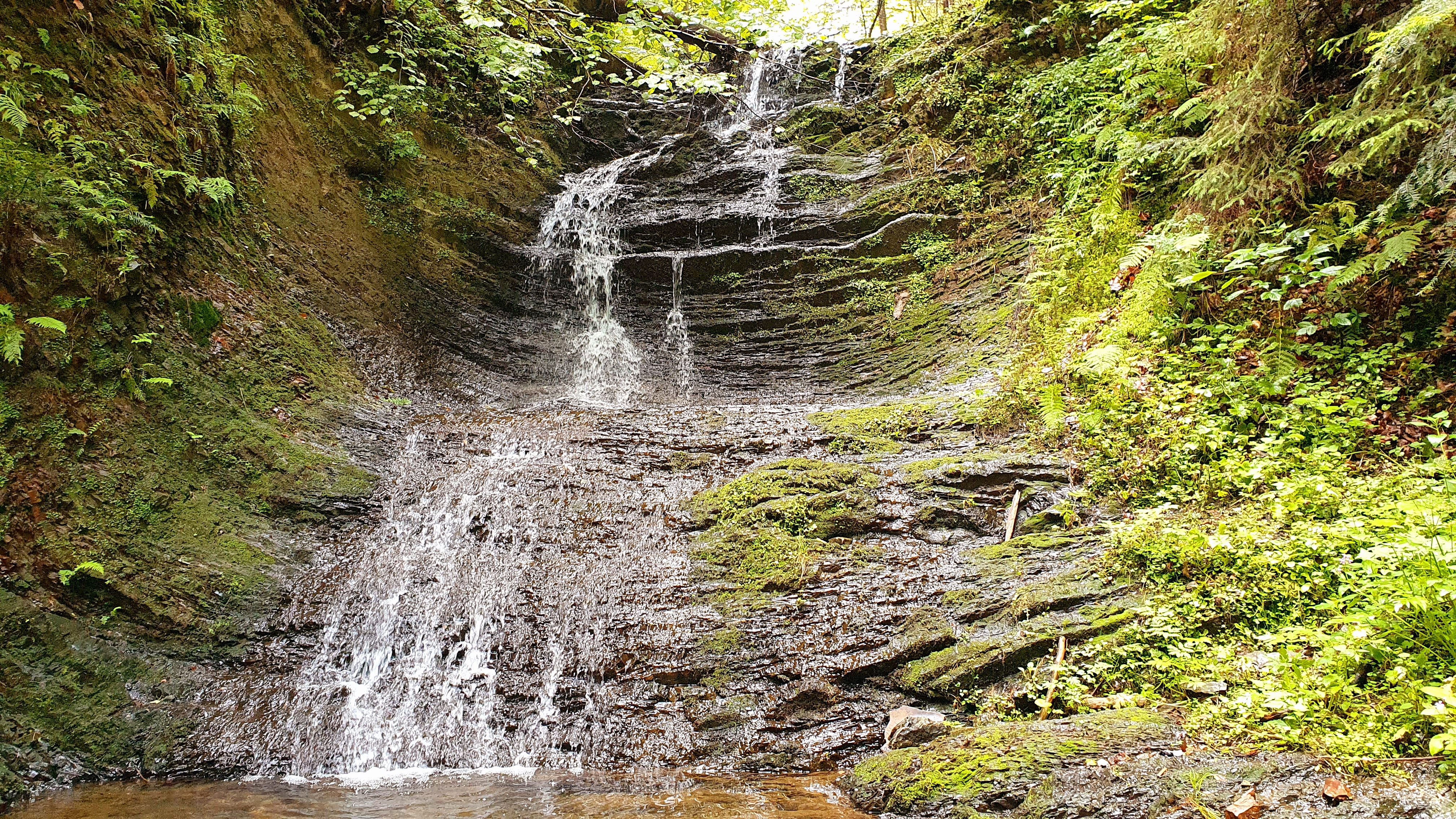 Абсолютно дикий та маловідомий широкому загалу водоспад розташований в с. Буковець (неподалік однойменного перевалу) Верховинського р-ну Івано-Франківської обл.